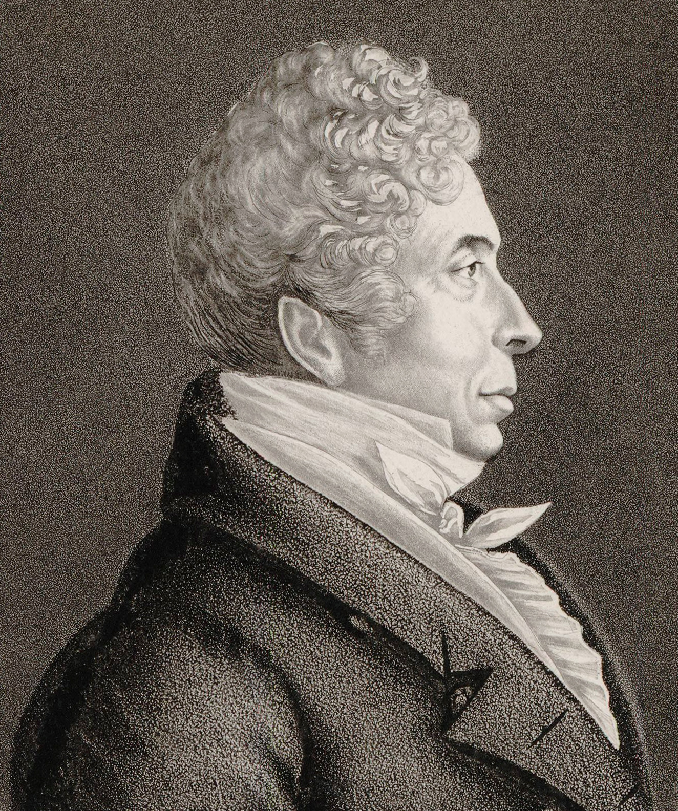 French opera singer and composer Pierre Gaveaux (1761-1825). Aquatint.